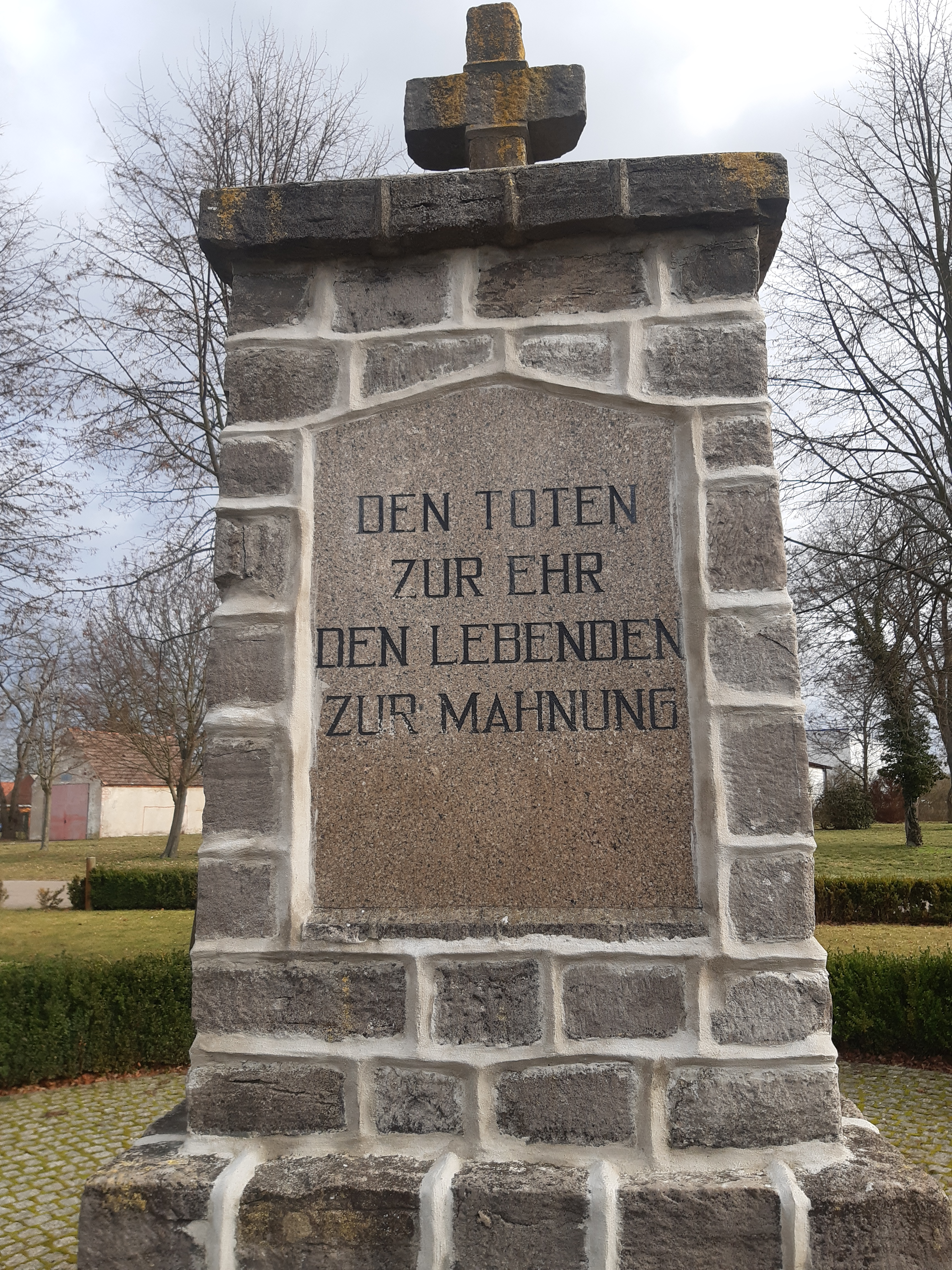 Kriegerdenkmal